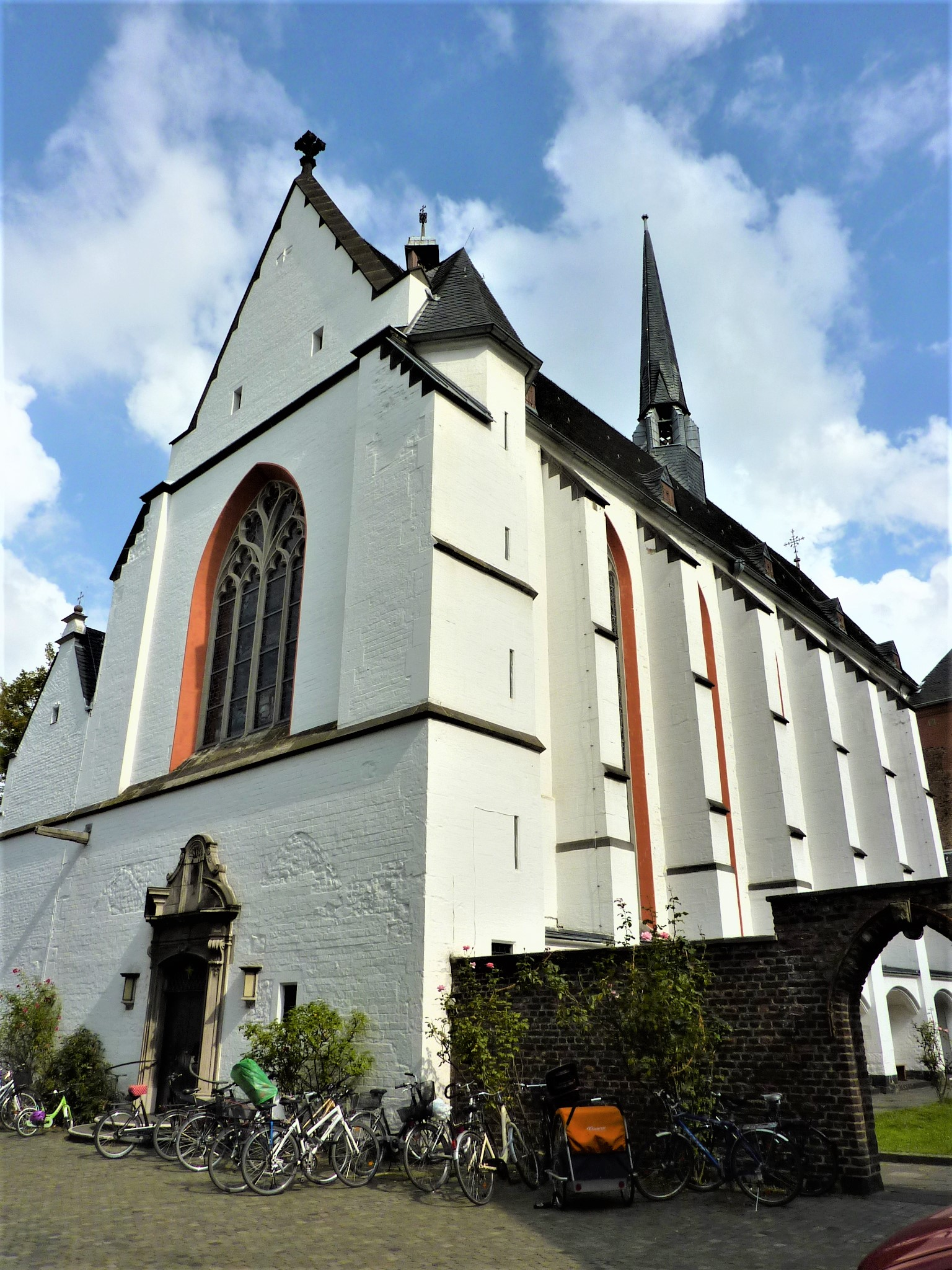 Kartäuserkirche (Köln)